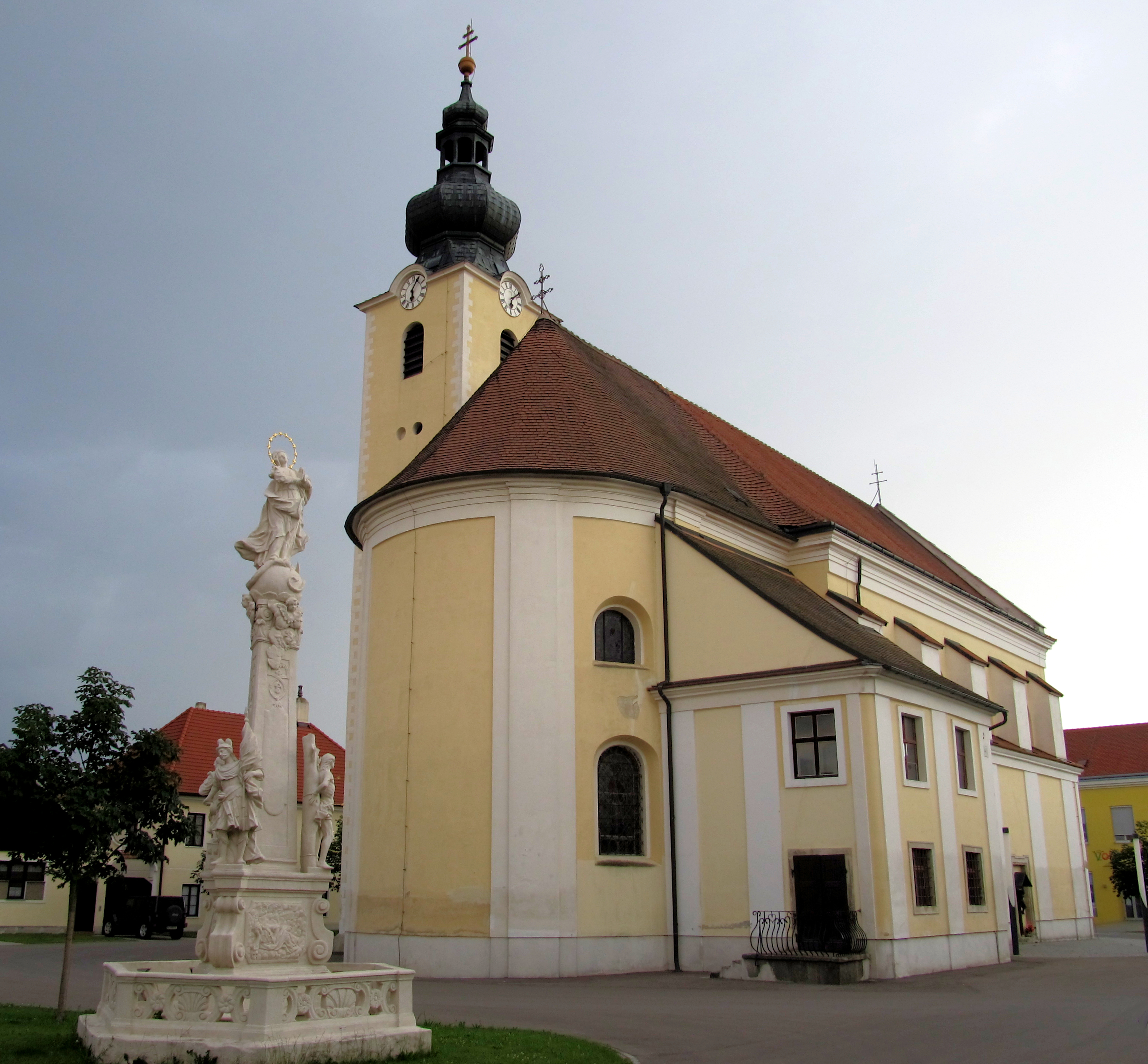 Stetteldorf - Pfarrkirche (im Juni 2012)